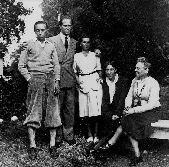 Gian Carlo Wick, Franco Antonicelli, Anita Rho, Silvia Rho e Barbara Allason